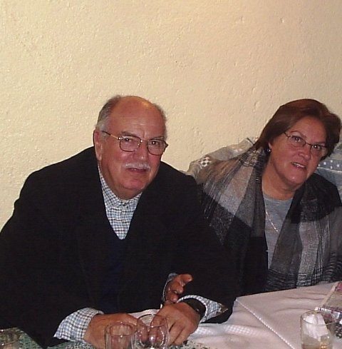 O ex-prefeito de Lavras do Sul, Ítalo Bayard La-Rocca Teixeira, com sua esposa, Helena.